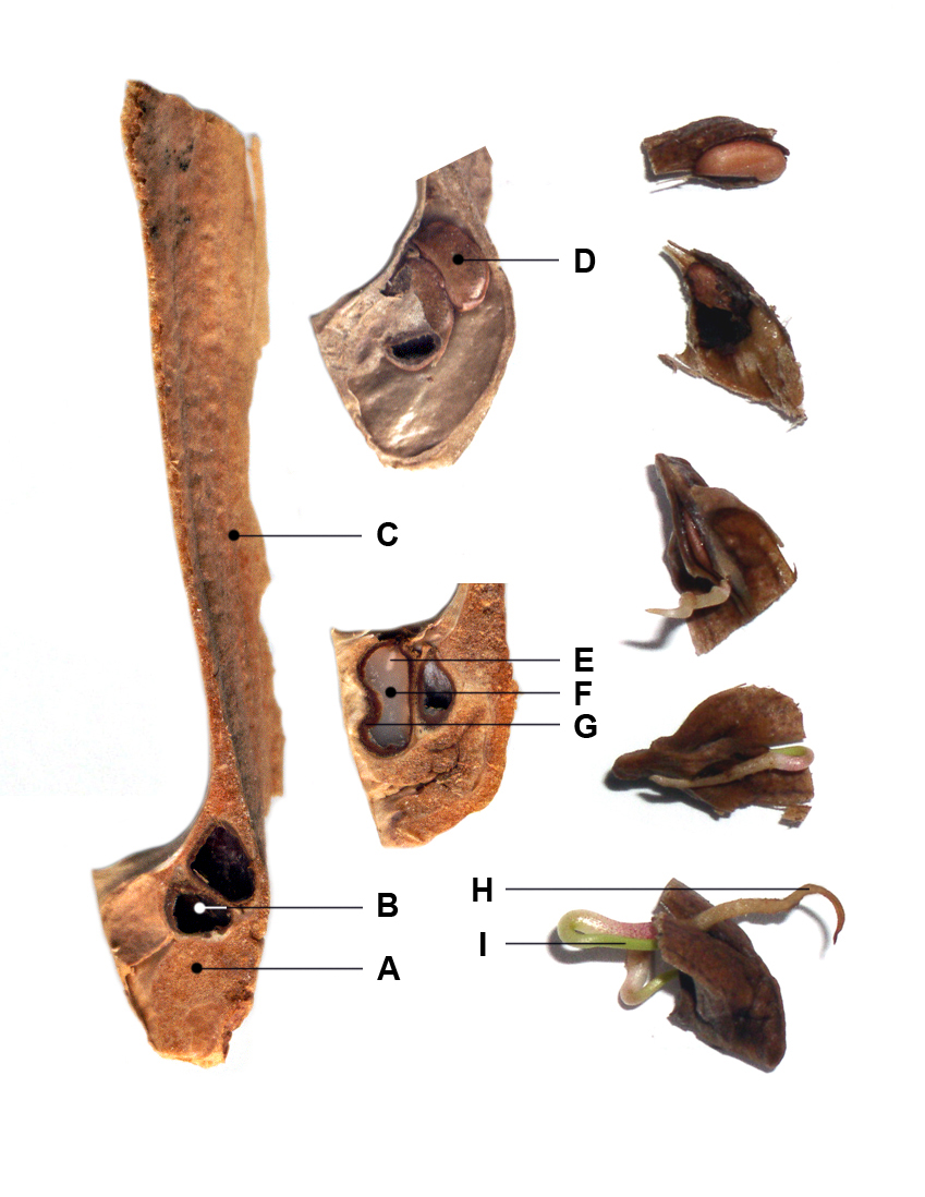 Уздужни пресек плода лалиног дрвета (А-перикарп, B-семена шупљина, C-крило, D-семе, E-ембрион, F-ендосперм, G-семењача) и клијање (H-коренак, I-хипокотил)(аутор: Михаило Грбић)